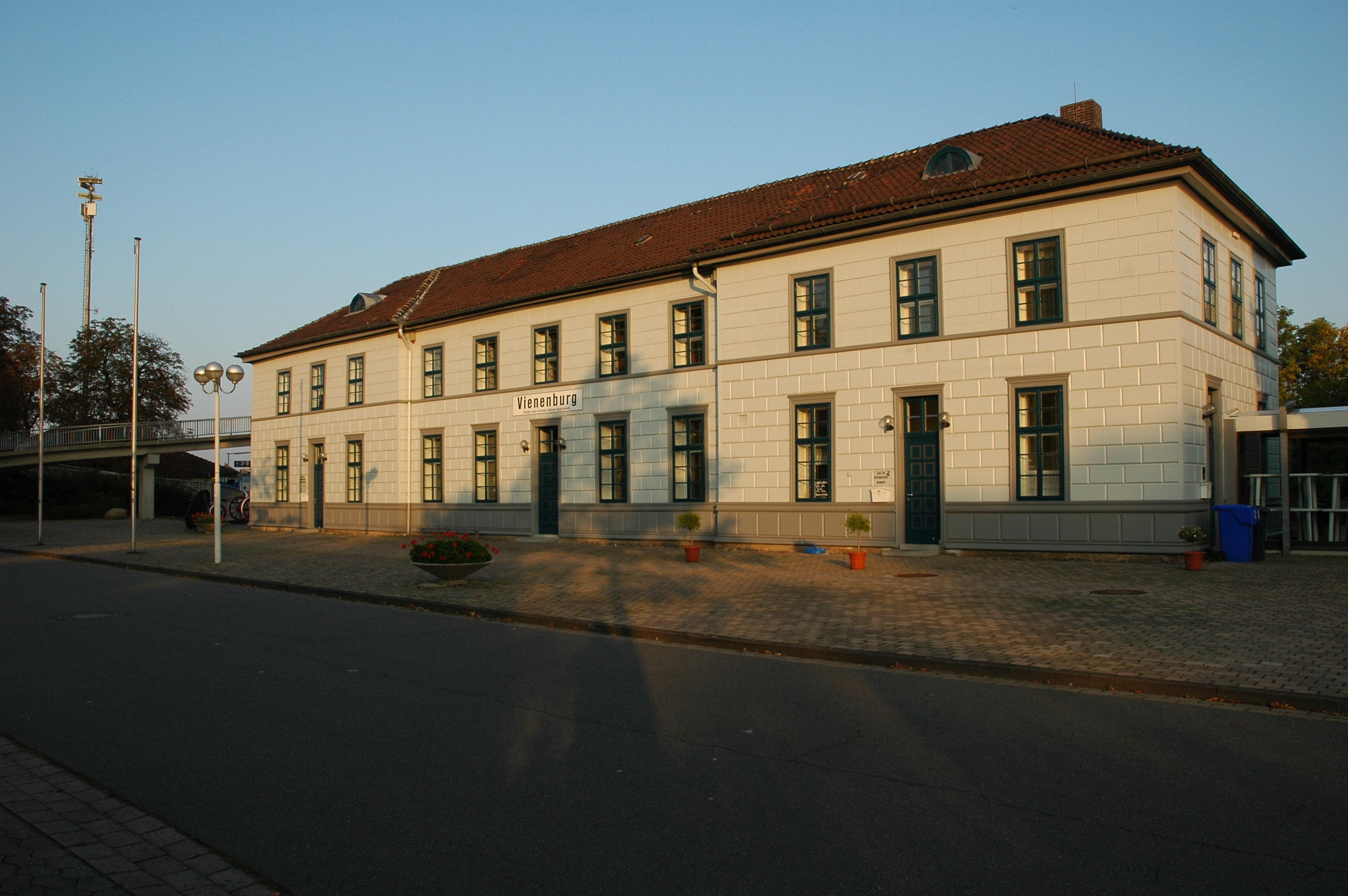 Bahnhof Vienenburg vom Bahnhofplatz. Auf dem Bahnhofsschild steht: „Vienenburg – ältester noch erhaltener Bahnhof Deutschlands“